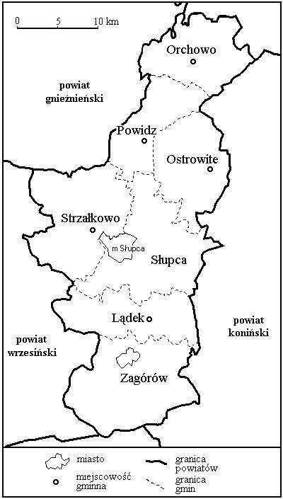 Gminy powiatu słupeckiego. (autor: Marcin Majdecki)